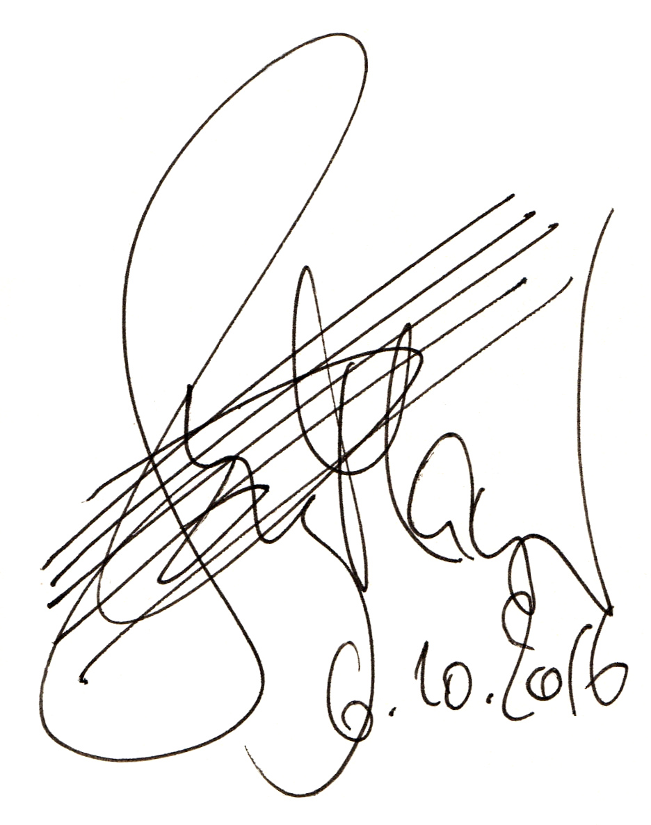 Buchsignierung des deutschen Autors Jörg Maurer